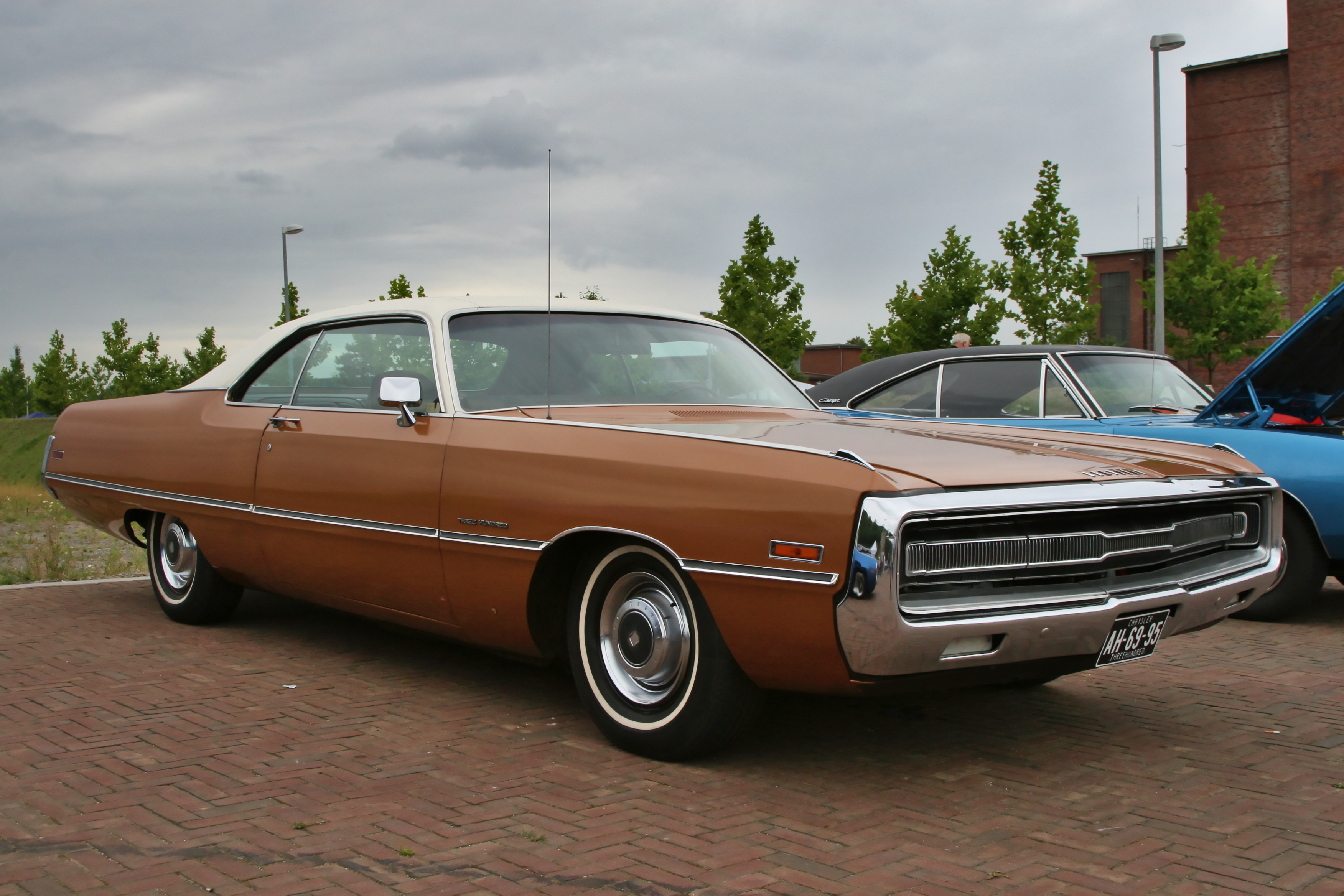 Zeche Ewald